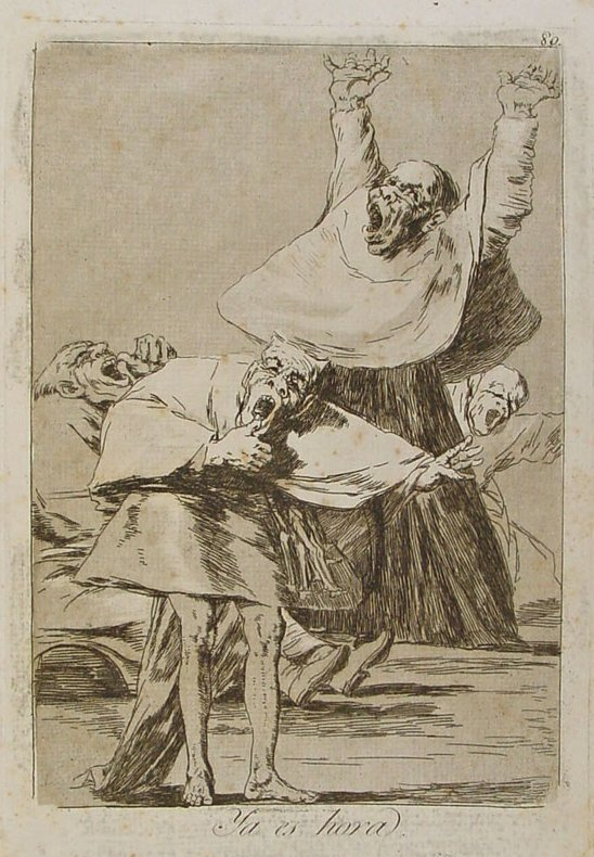 Capricho nº 80: Ya es hora de Goya, serie Los Caprichos